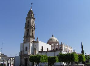 La ciudad de Uriangato, la ciudad mas importante para el comercio textil mexicano